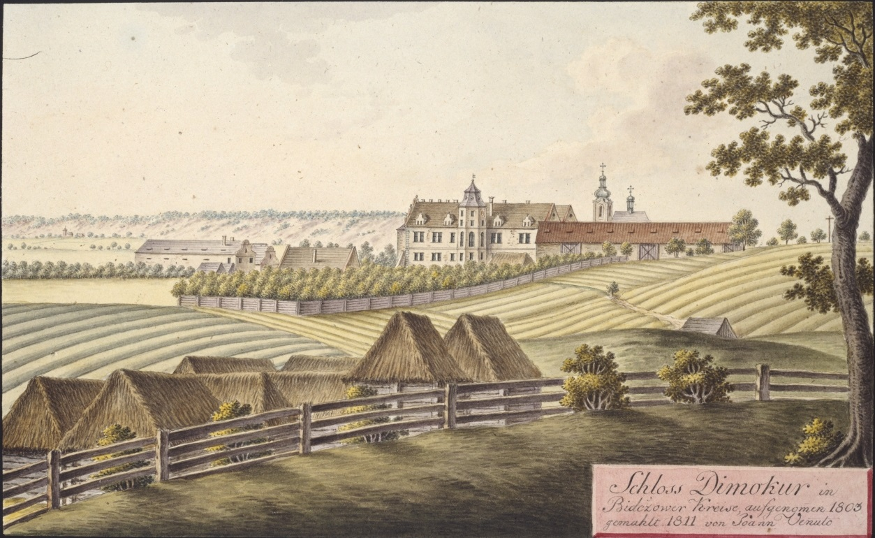 Dymokury. Schloss Dimokur in Bidczower Kreise, aufgenommen